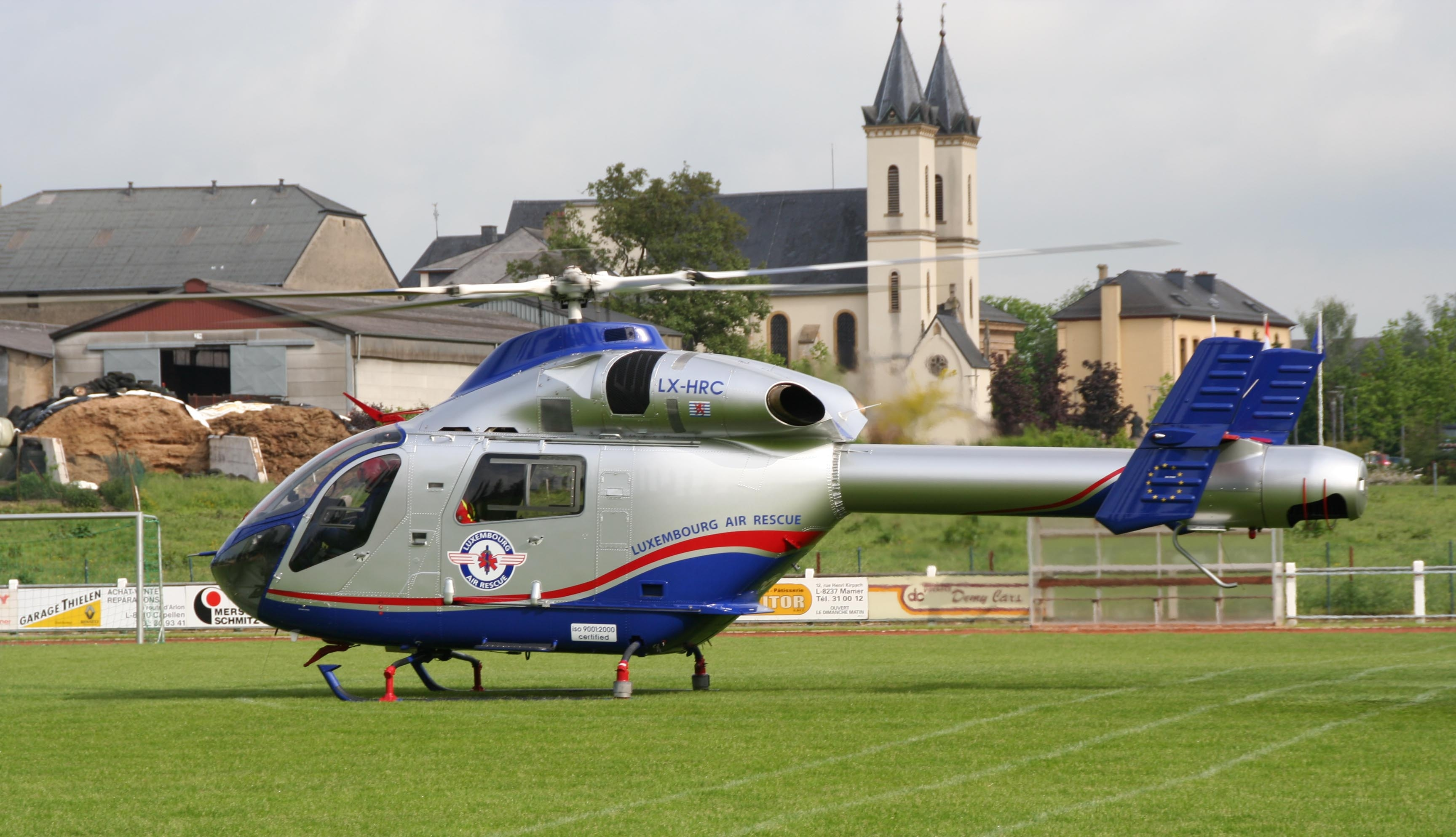 LAR Helikopter LX-HRC zu Mamer. Kategorie:Helikopteren